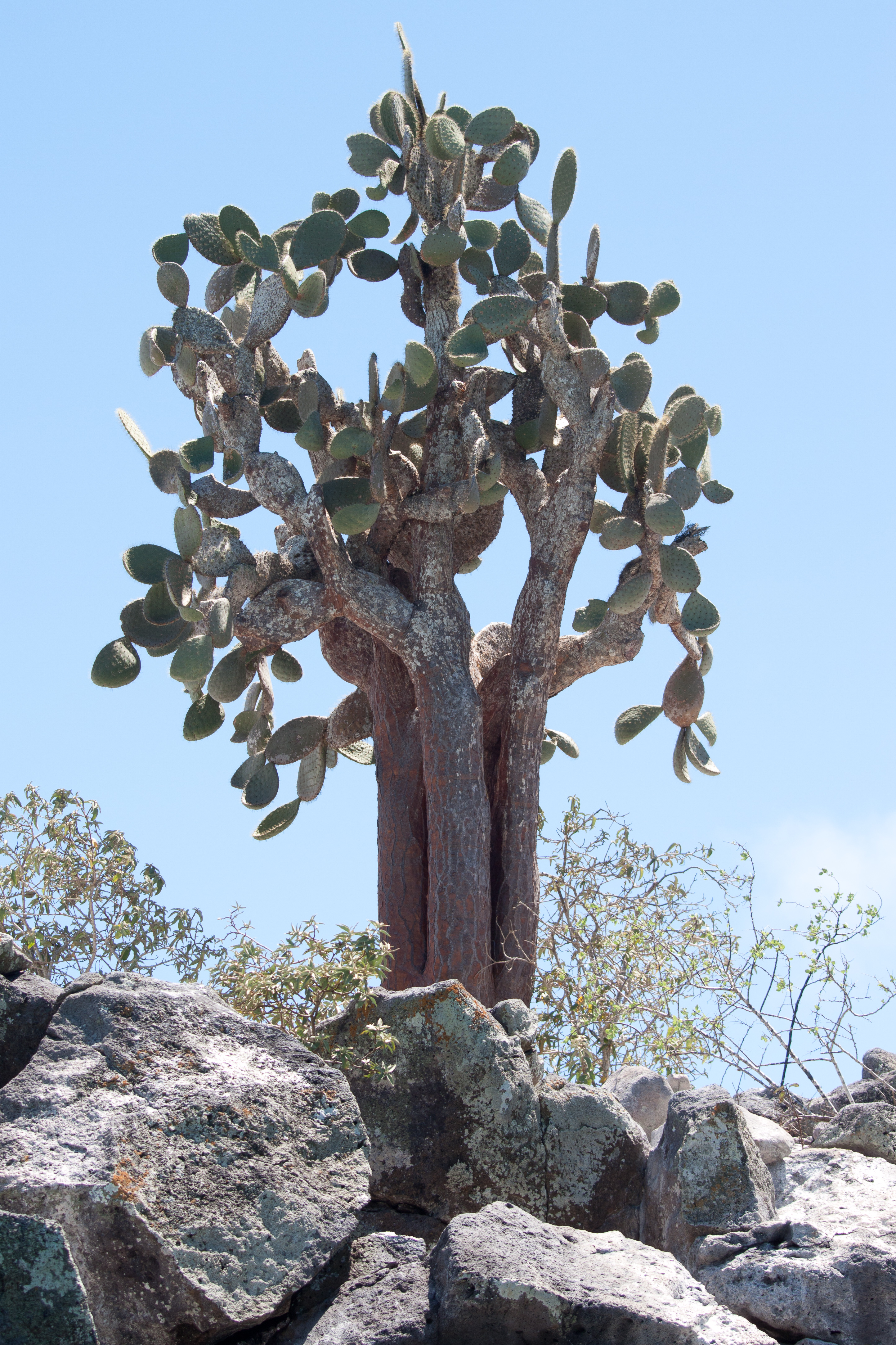 IMG_5213-19.jpg